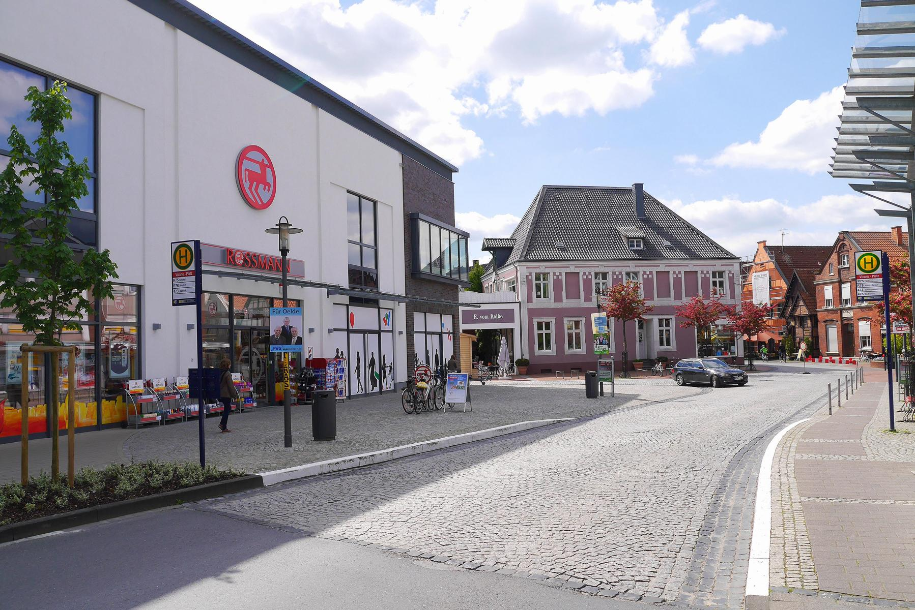 Vicarie-Platz in Oelde, Richtung Innenstadt